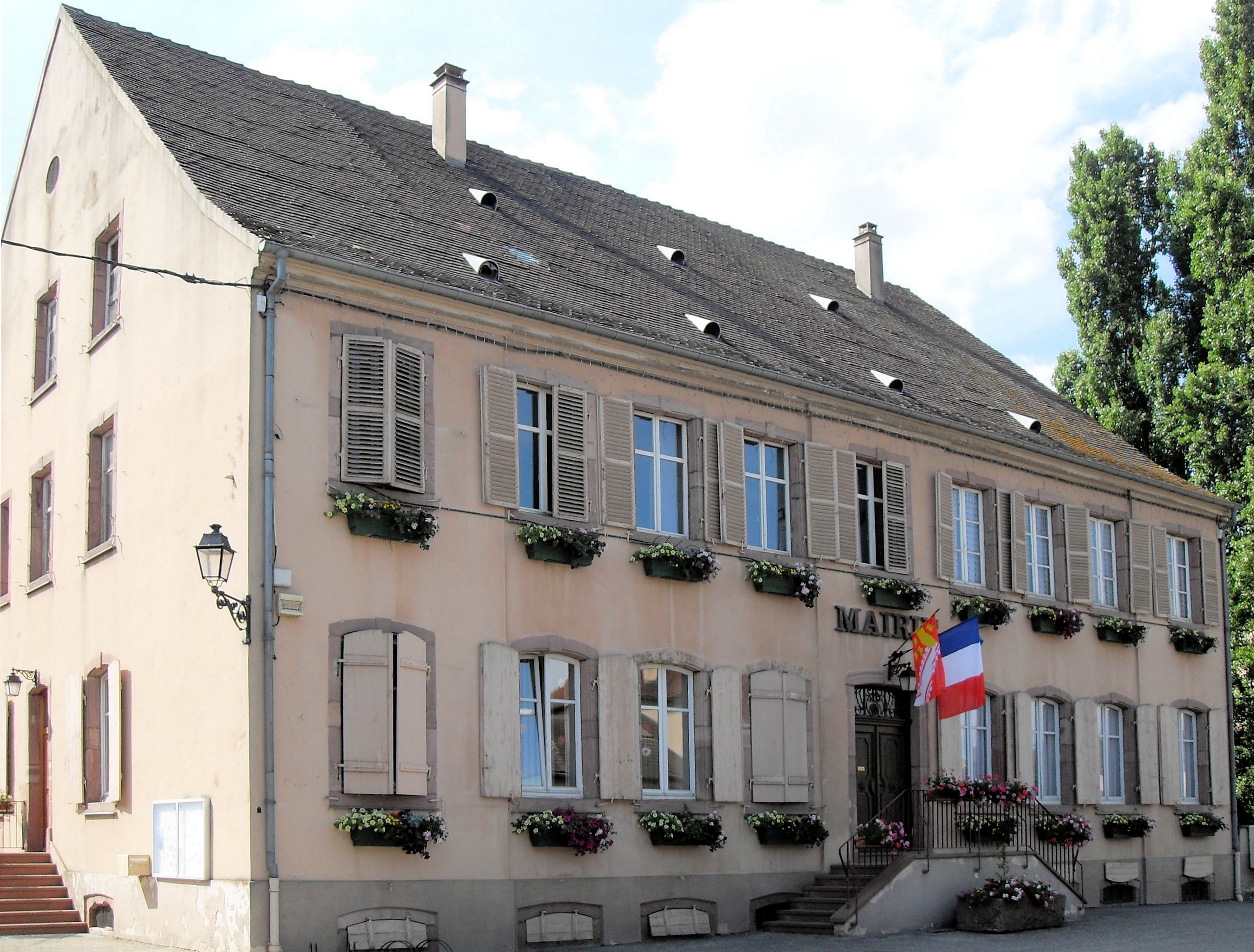 La mairie d'Oberhergheim